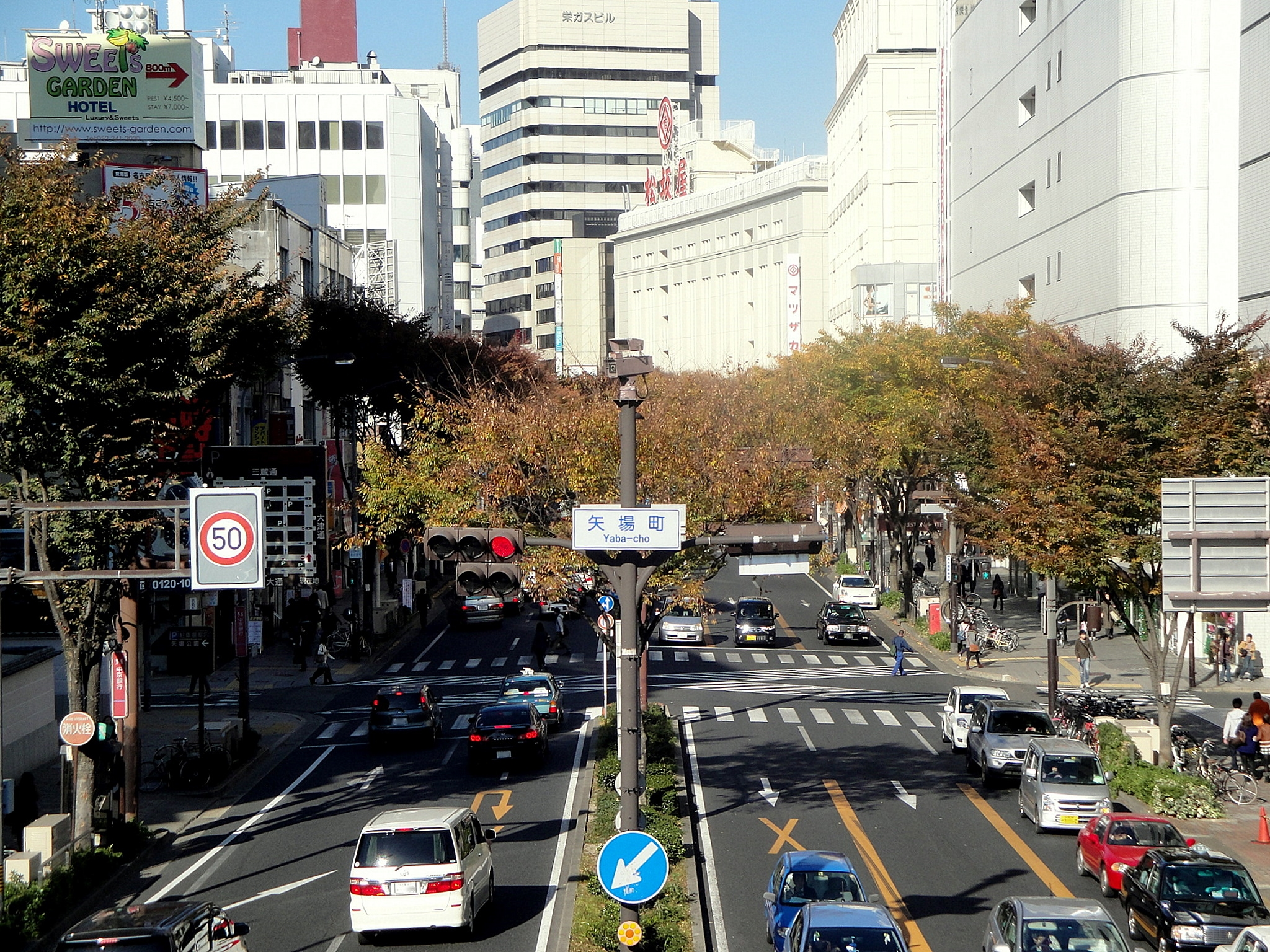 矢場町交差点付近